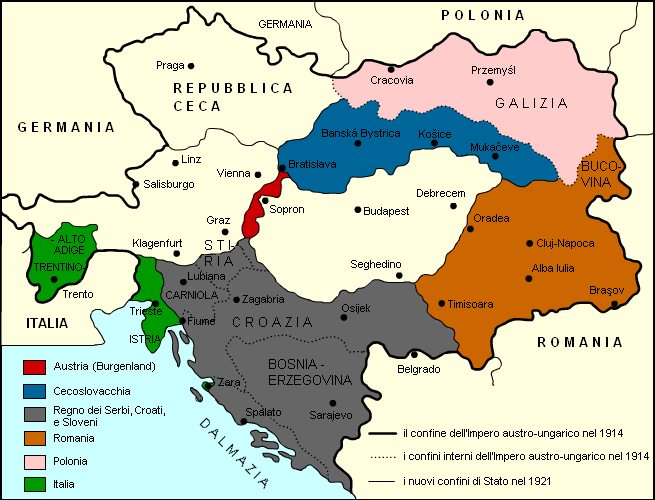 Variazioni nei confini dell'Impero austro-ungarico dopo il Trattato del Trianon del 1920.